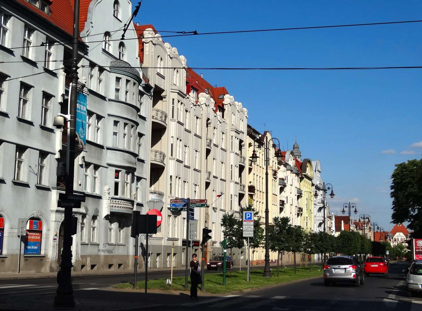 Aleja Adama Mickiewicza w Bydgoszczy